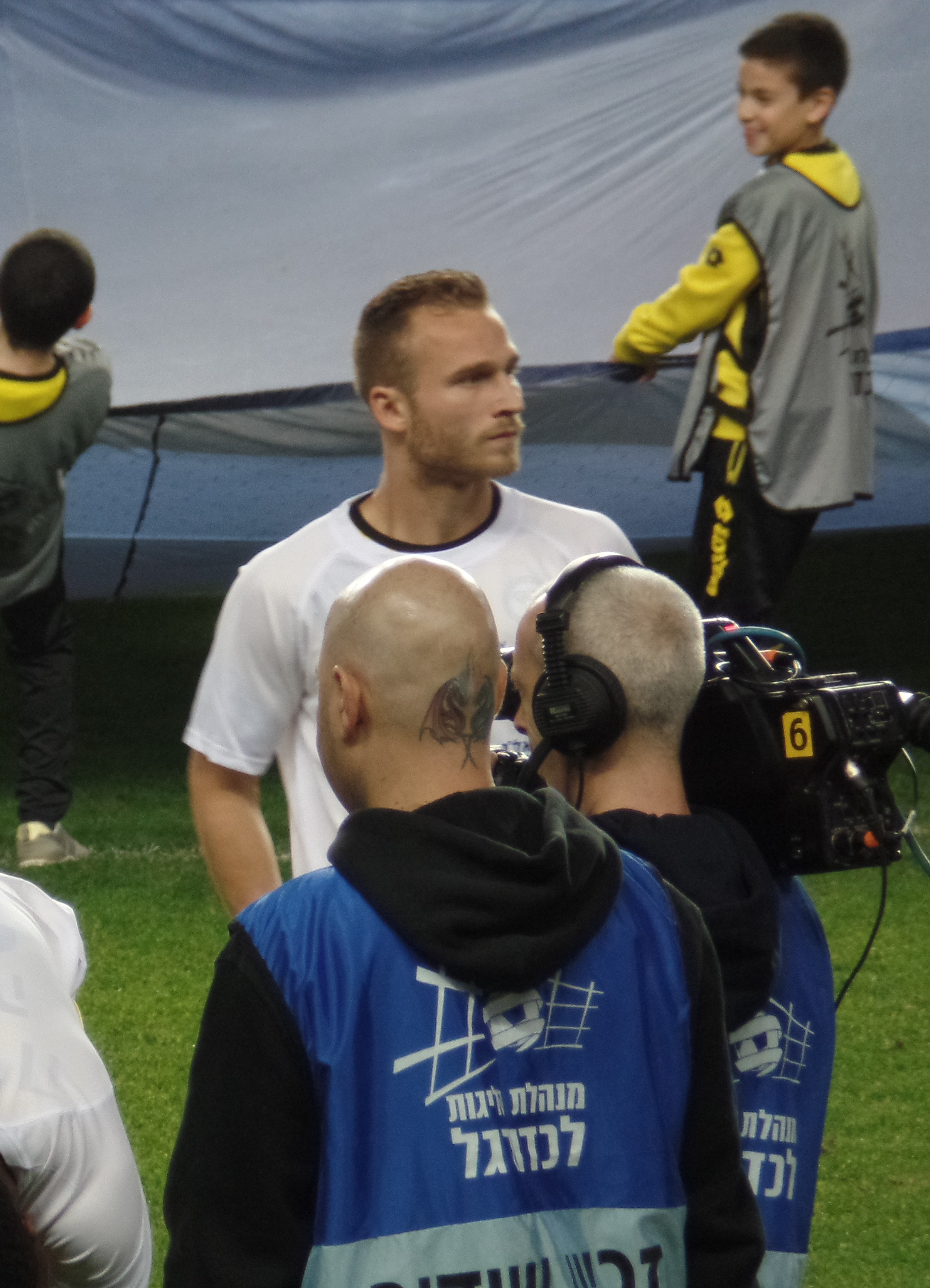 דן גלזר לפני משחק בליגת העל, 2018